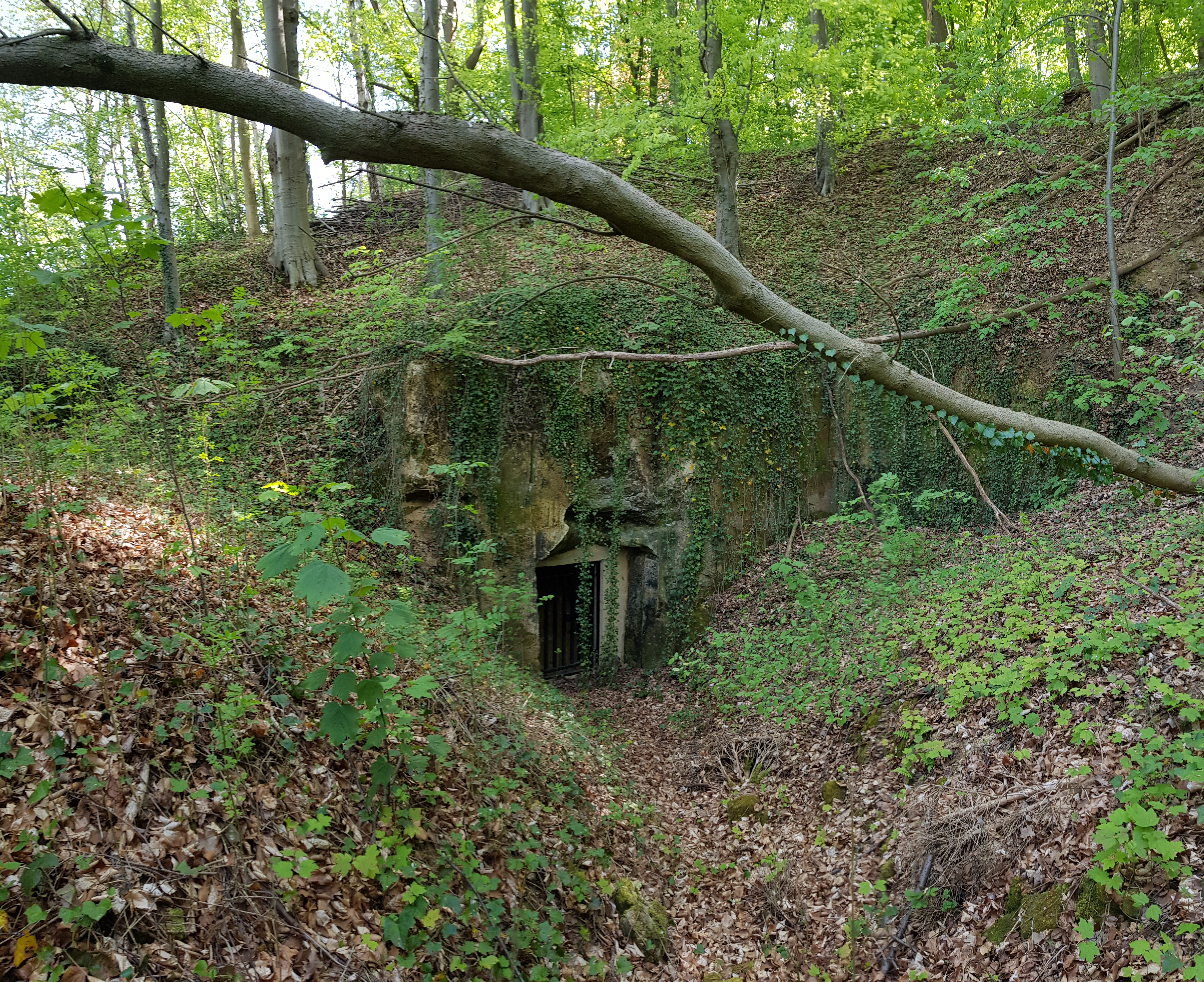 Vogelbosgroeve aan de Daalhemerweg, Valkenburg aan de Geul, Nederland